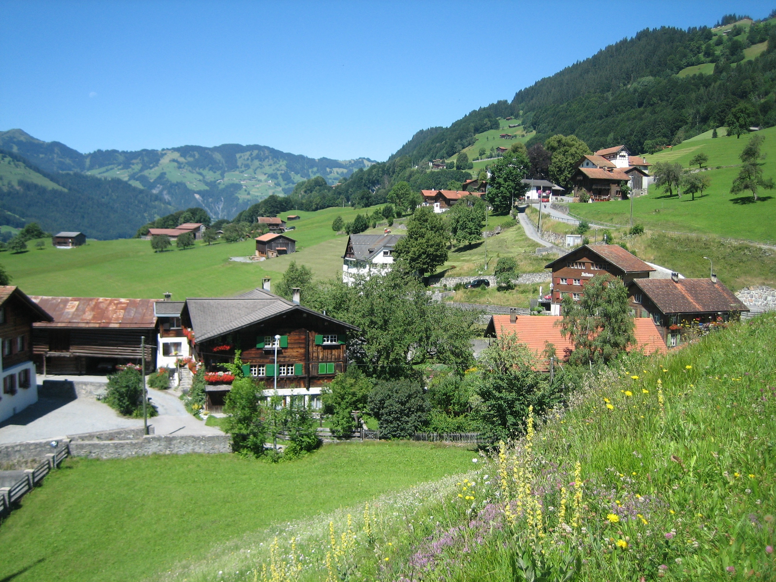 Luzein GR